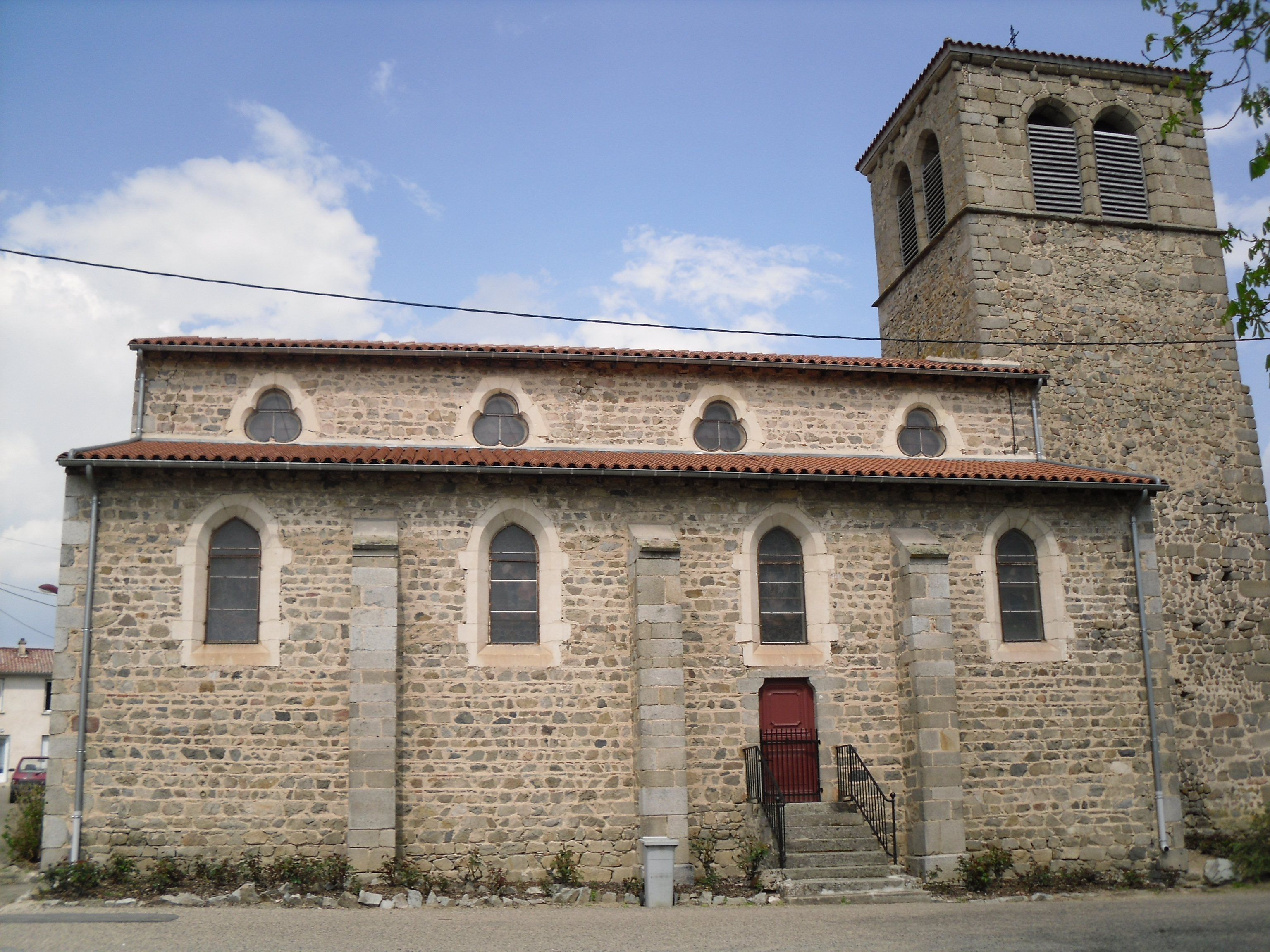 Clocher carré